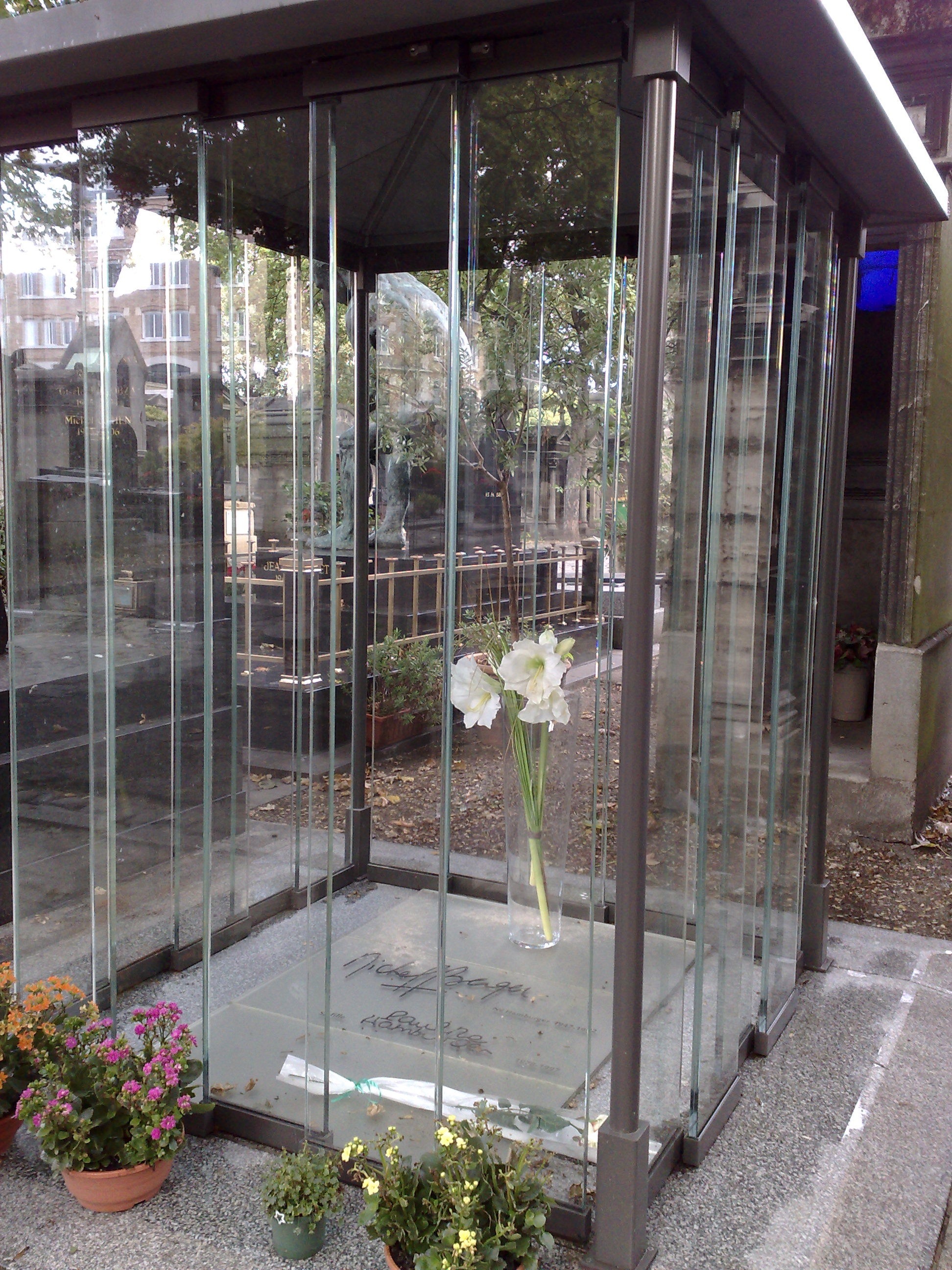 Grab von Michel Berger, Tochter Pauline Hamburger (+1997) - rechts von deren Grab liegt sein Vater Jean Hamburger.